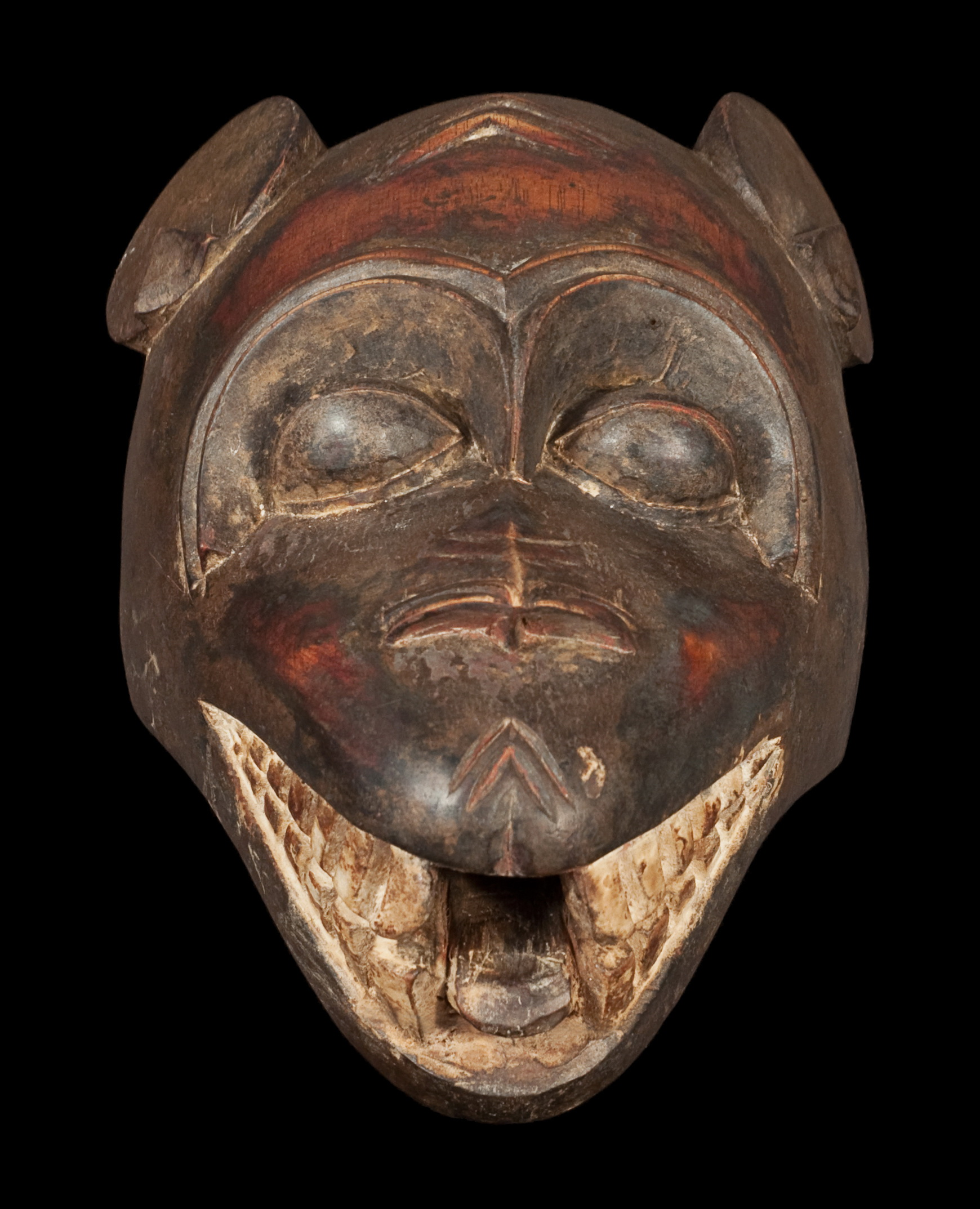 Masque africain représentant un singe